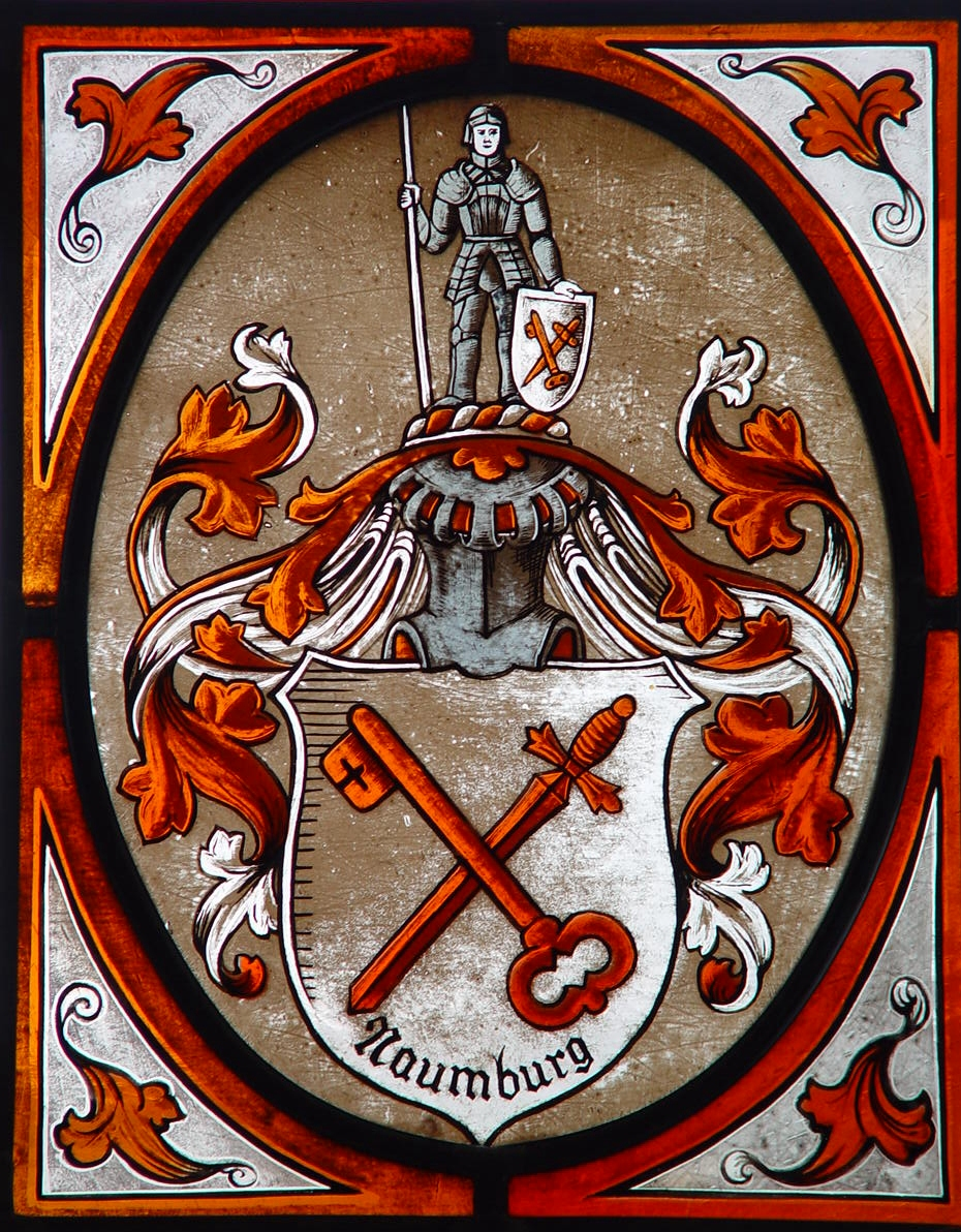 eigene Ausführung